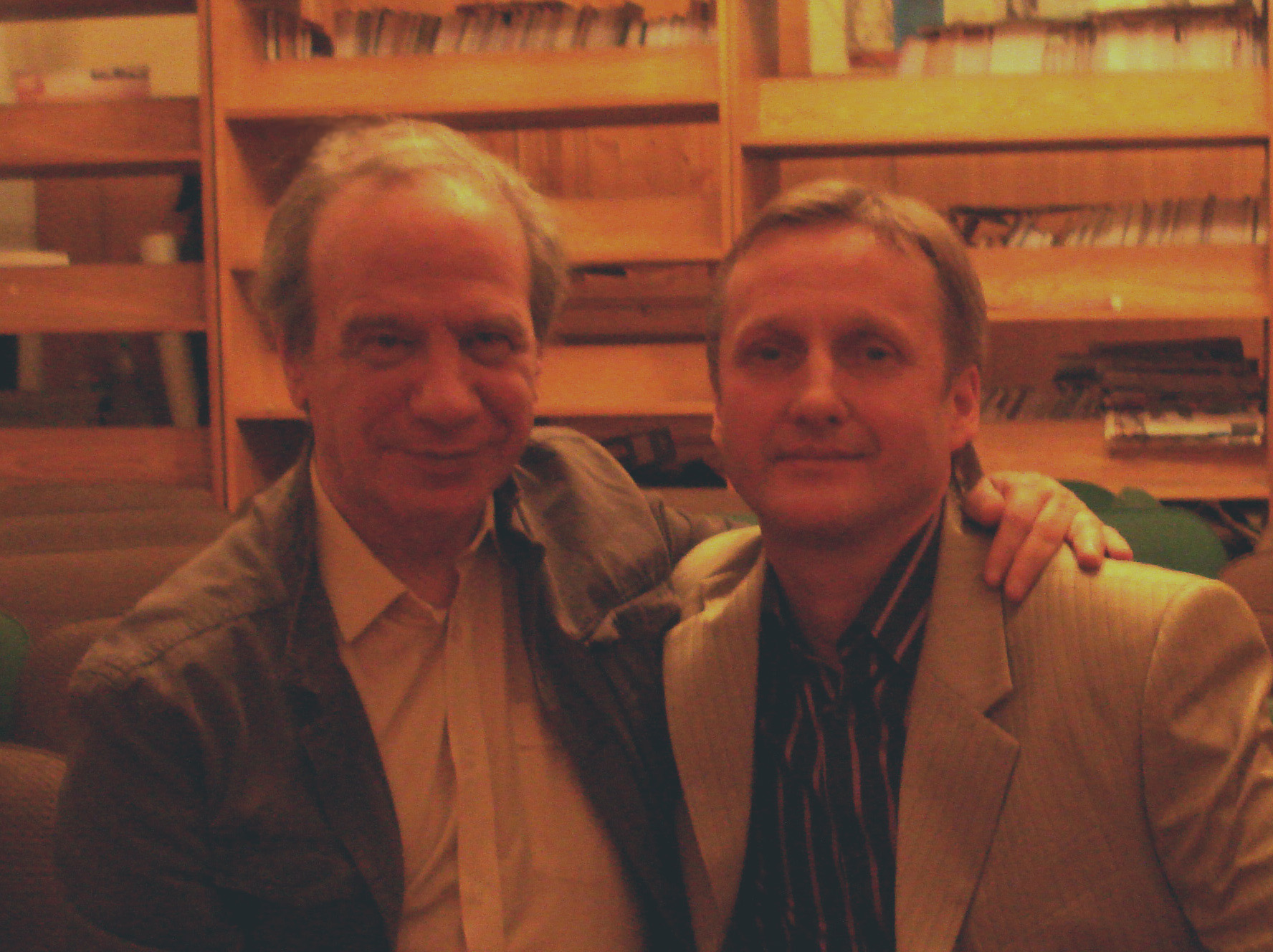 Номинант на Нобелевскую премию поэт и философ Костантин Кедров, поэт и художник Александр Вепрёв. МГО СП России, Москва. Декабрь, 2010 г.